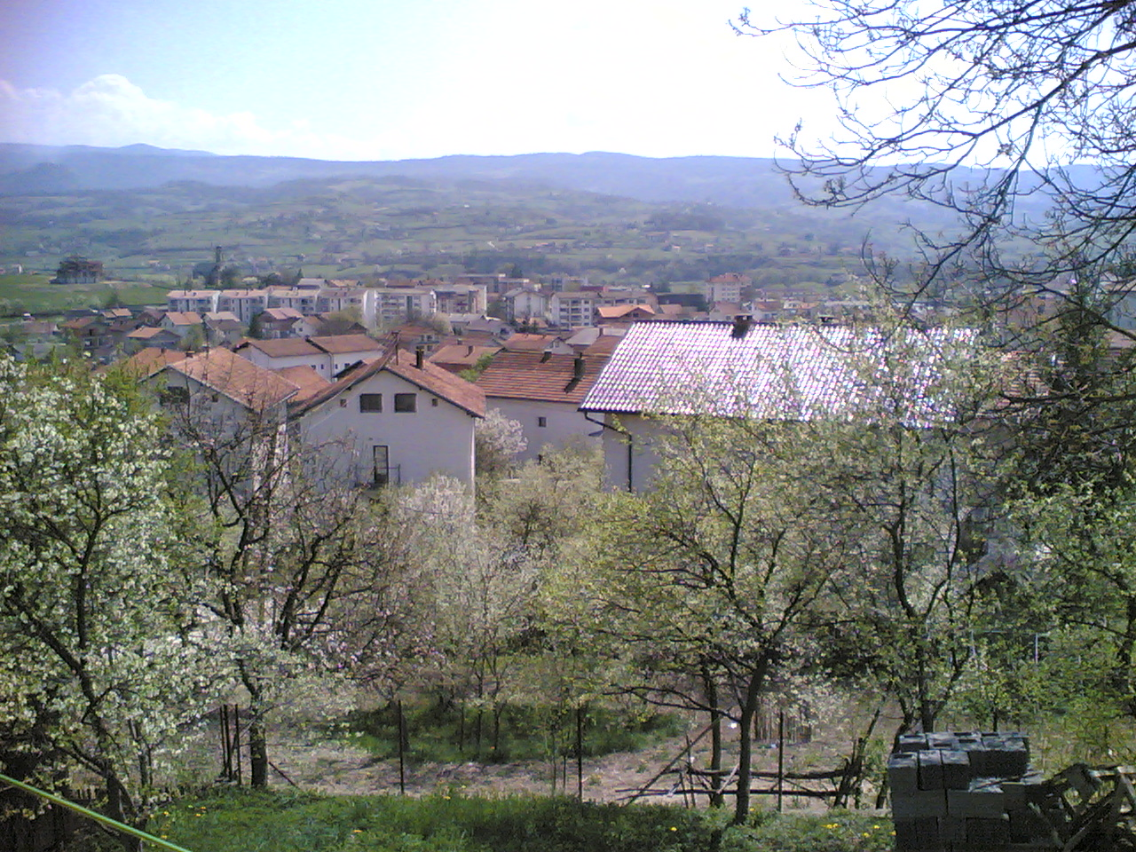 Šipovo